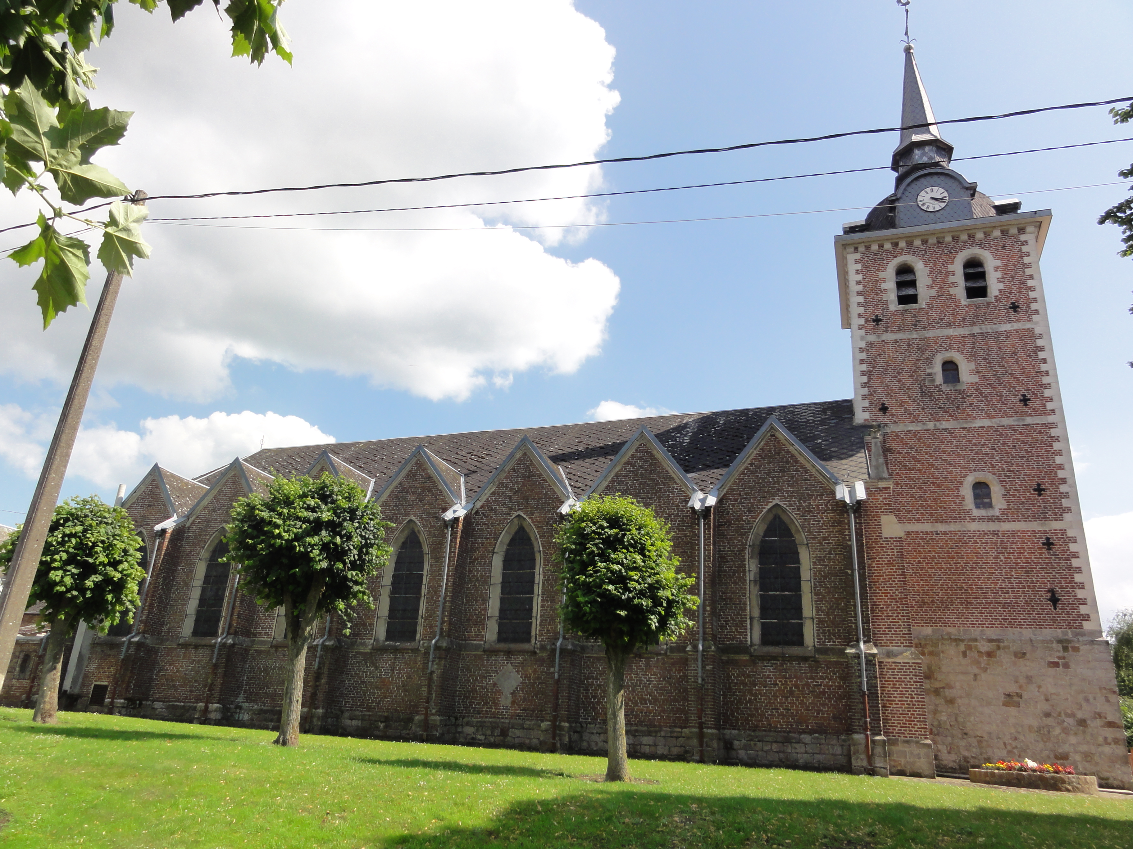 Vertain (Nord, Fr) église